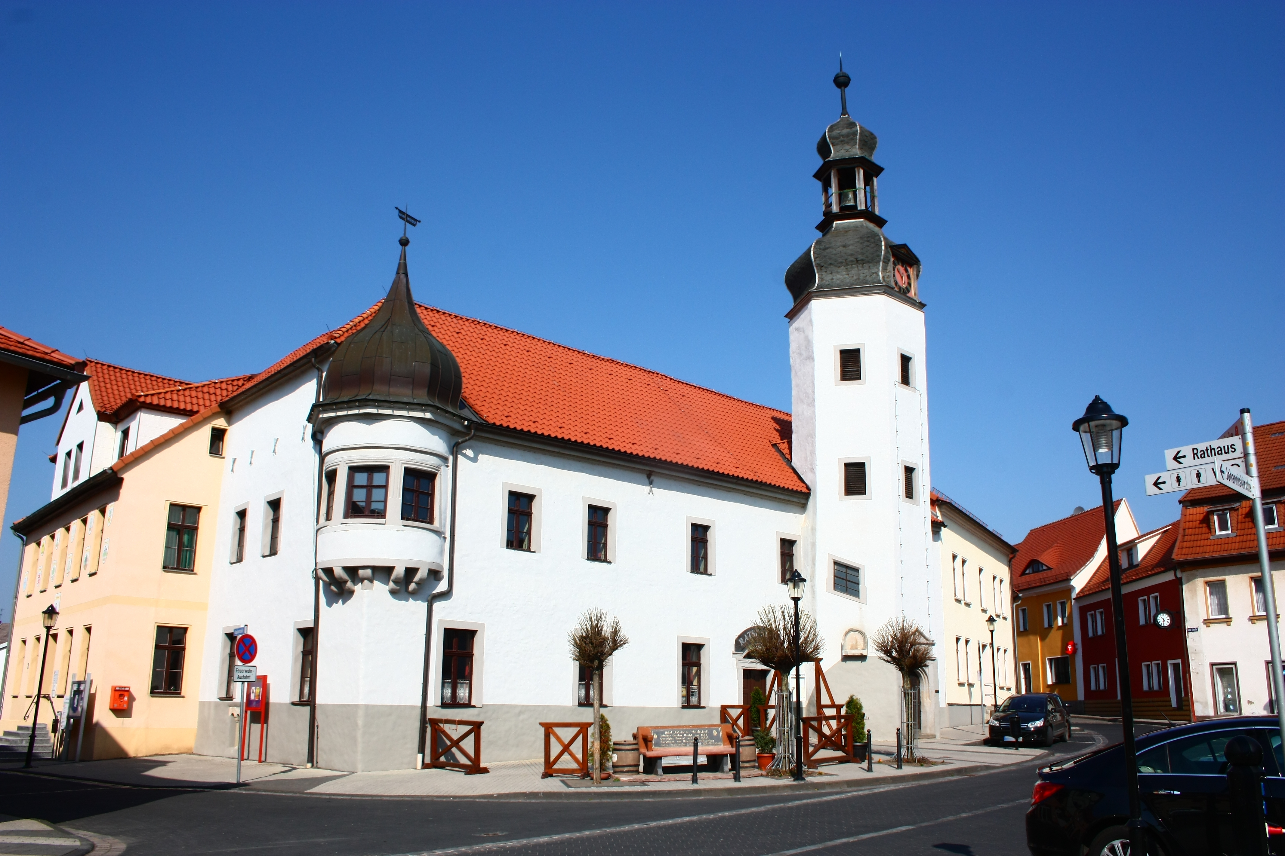 das Rathaus von Gerbstedt bei blauem Himmel